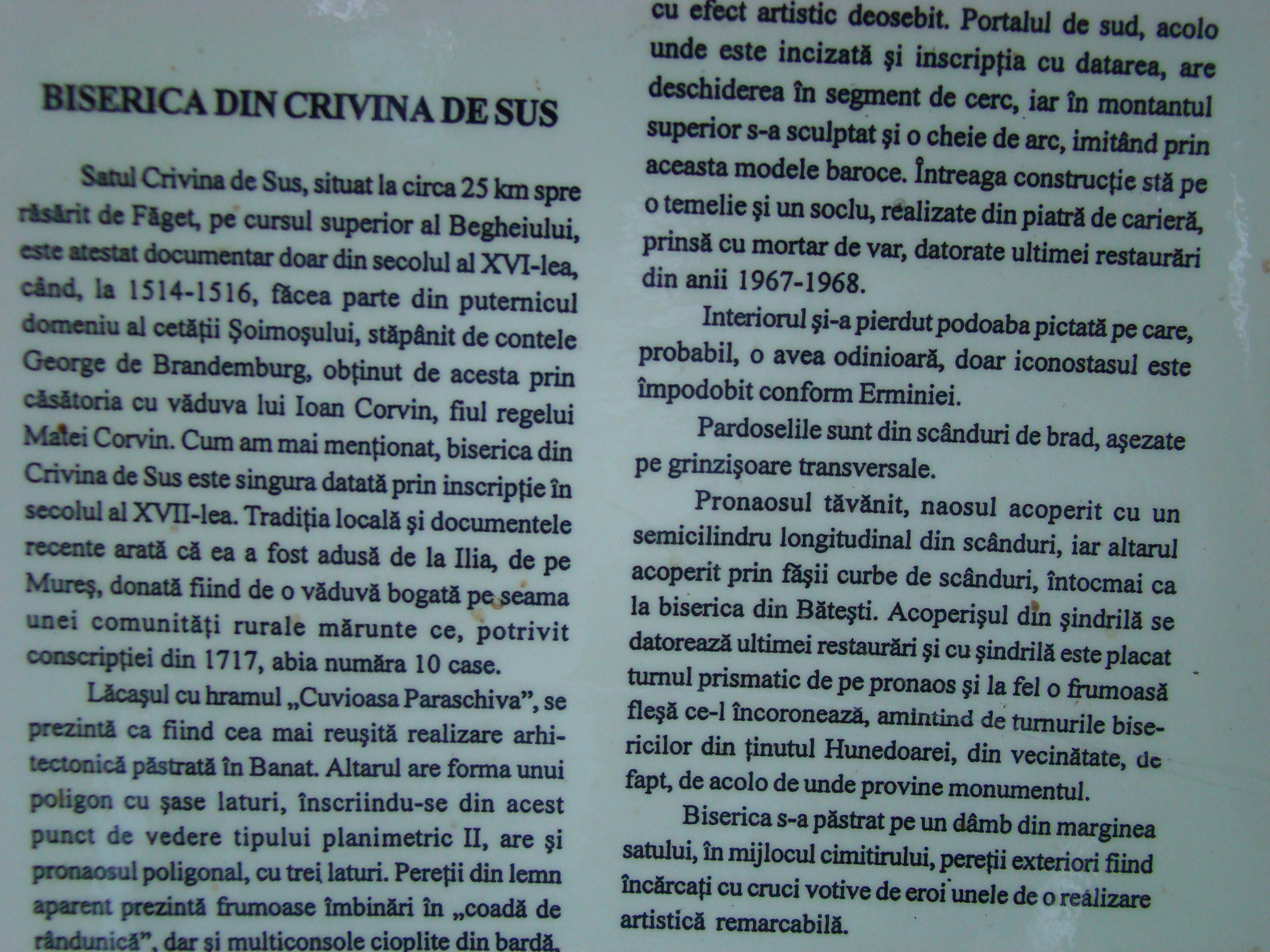 Istoricul Bisericii de lemn din Crivina de Sus